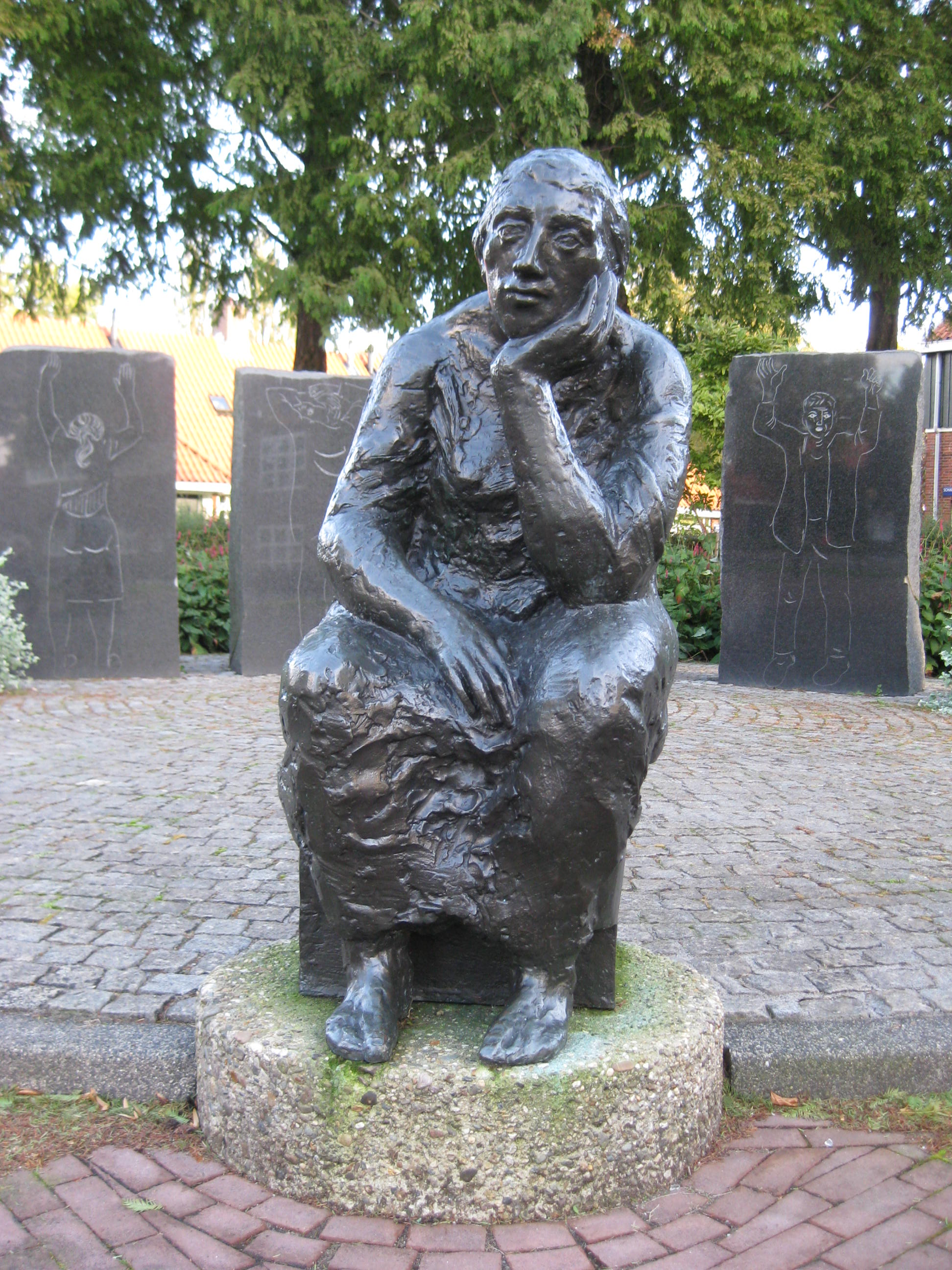 Bronzen Bezinningsmonument Nieuwendam uit 1983 van Marius van Beek in Amsterdam-Nieuwendam.